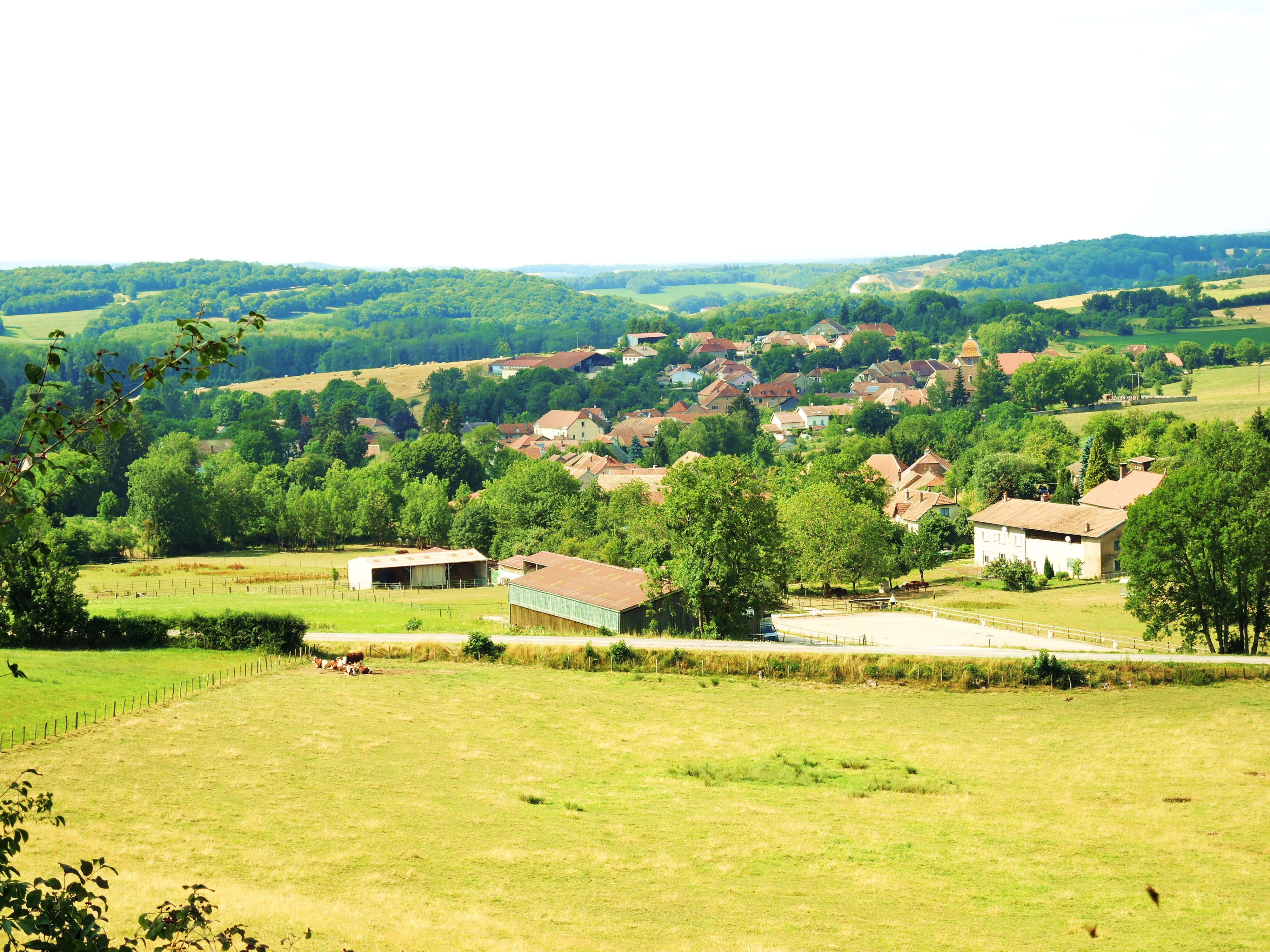 Panorama sur le village de Courchaton.